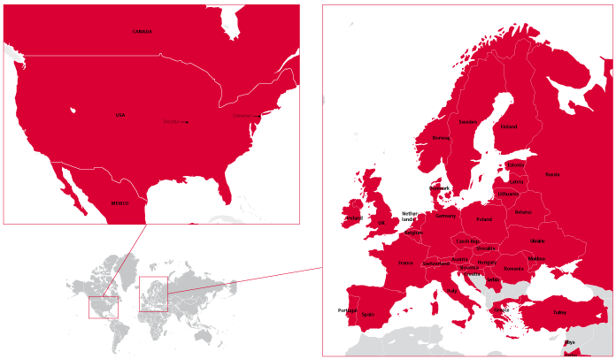 Meda Pharma'nın Faaliyet Gösterdiği Ülkeler